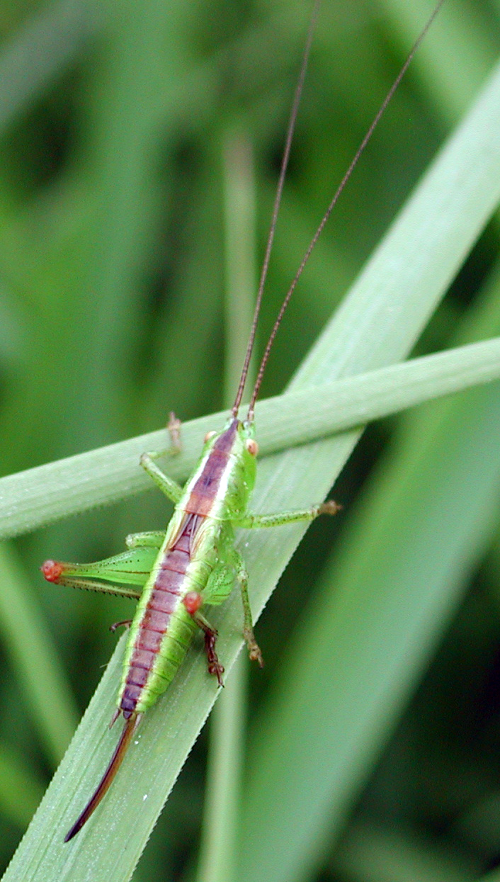 Conocephalus dorsalis, f., Kurzflügelige Schwertschrecke, NSG Kirchwerder Wiesen, Elbmarsch bei Hamburg, Deutschland